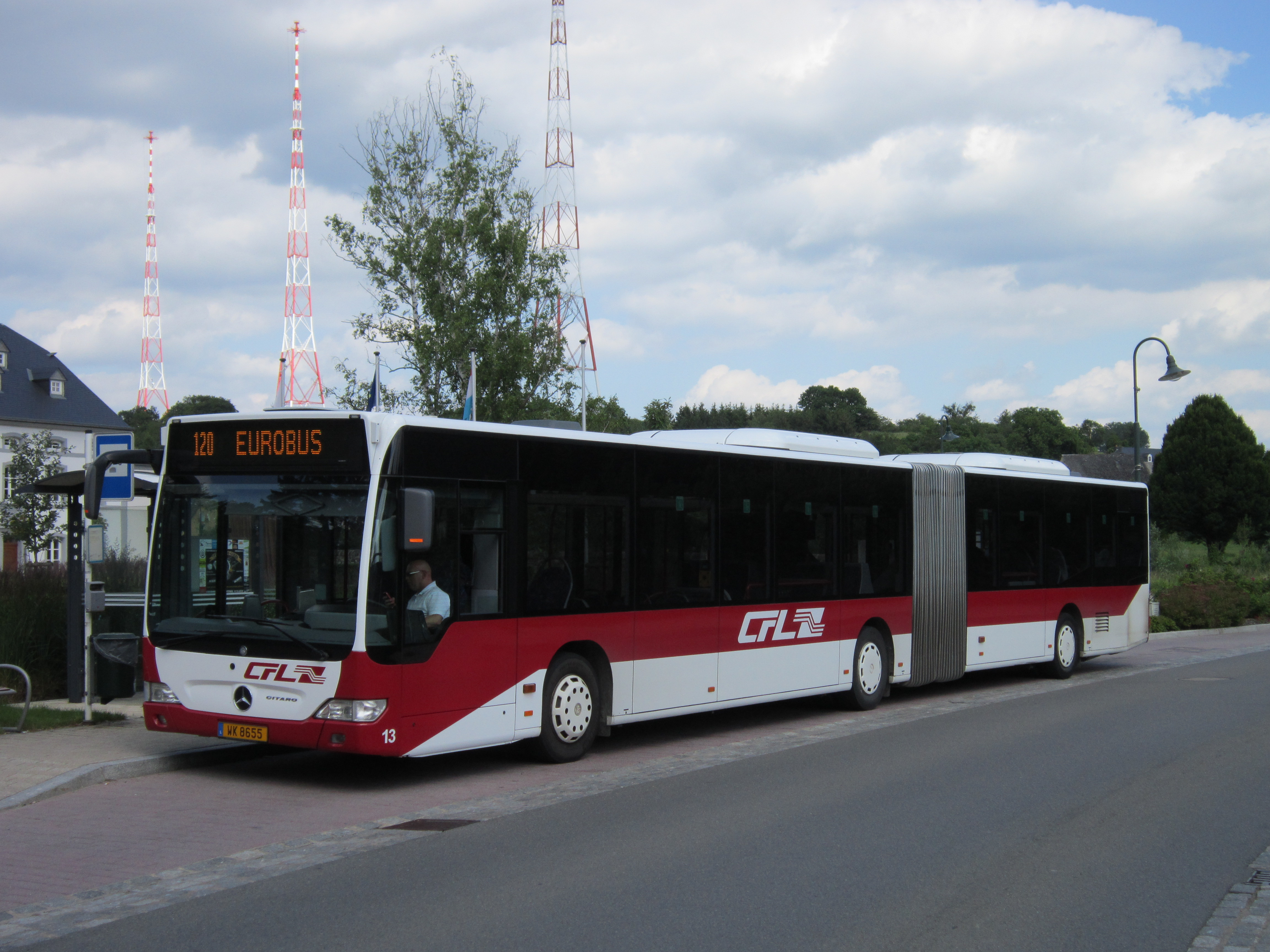 Bus articulé du réseau CFL au terminus à Junglister.